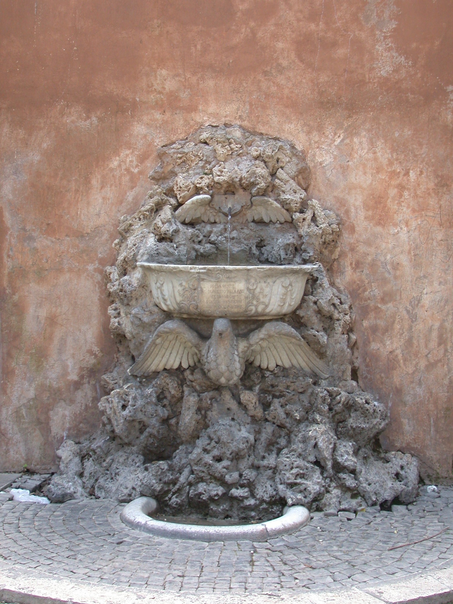 Roma, giardini fra la chiesa di S. Alessio e quella di Santa Sabina (Aventino, rione Ripa), fontanella proveniente dal demolito palazzo Accoramboni in Borgo.